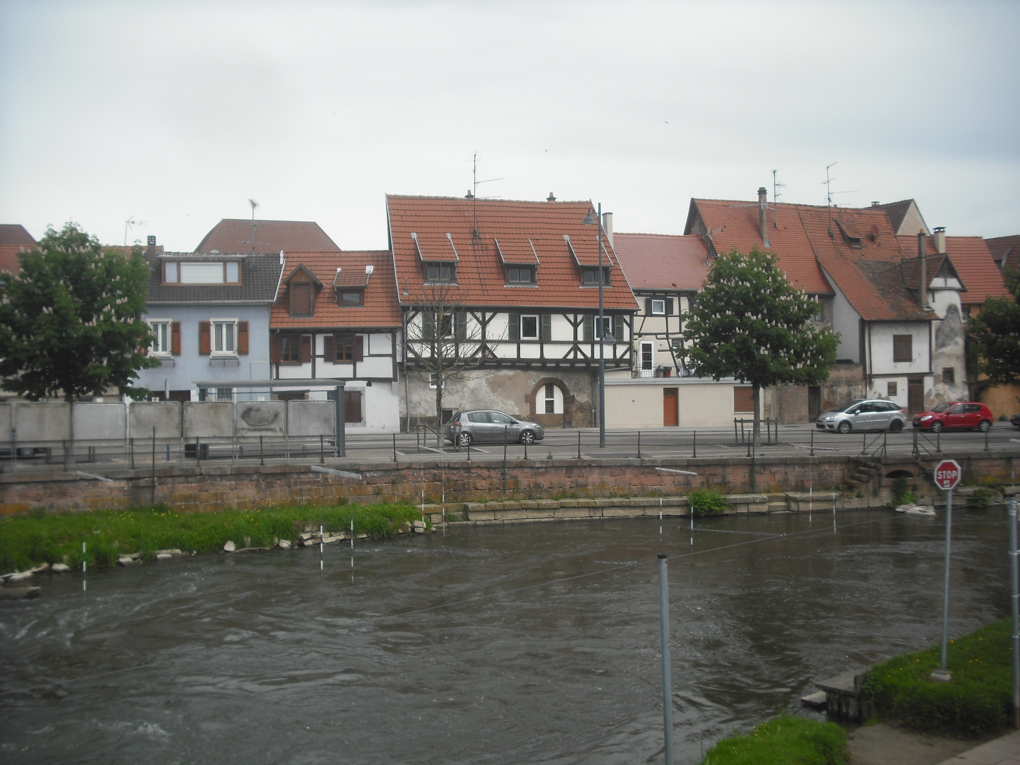 Quai de l'Ill, Sélestat, France